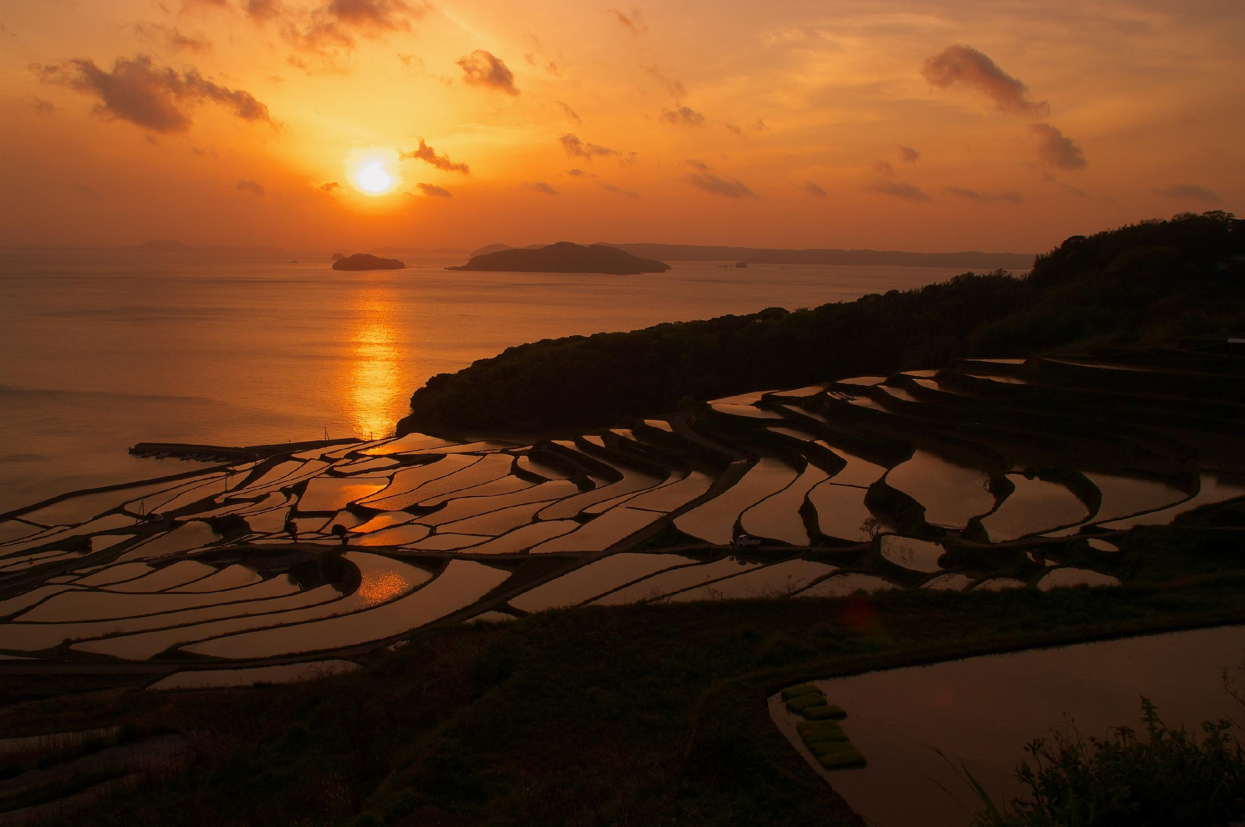 土谷棚田